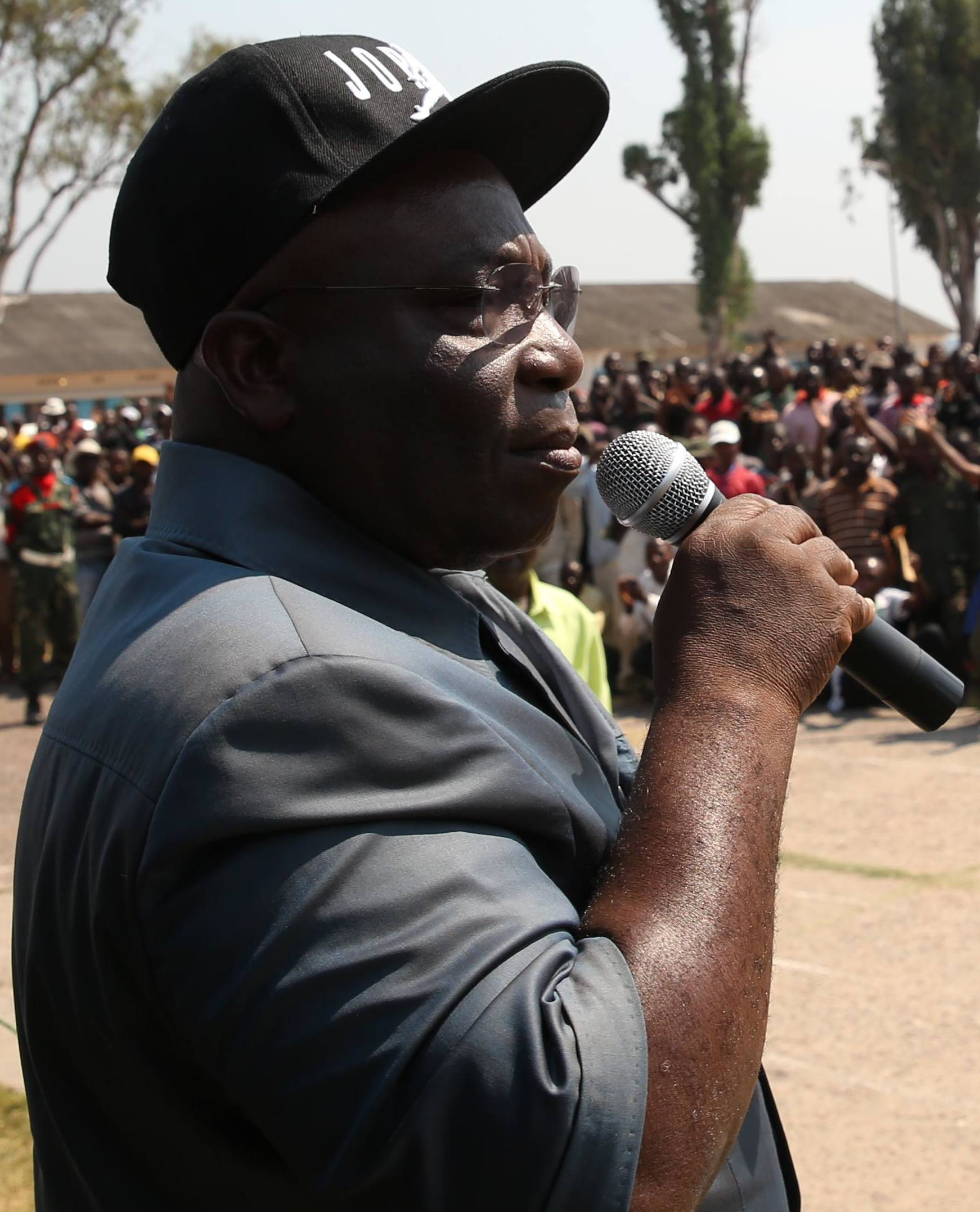 Allocution du Ministre de la défense et des anciens combattants Aimé Ngoy Mukena à Kamina.